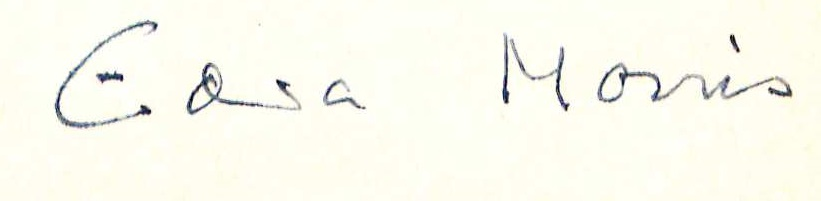 Edita Morris Widmung im Buch Three who loved